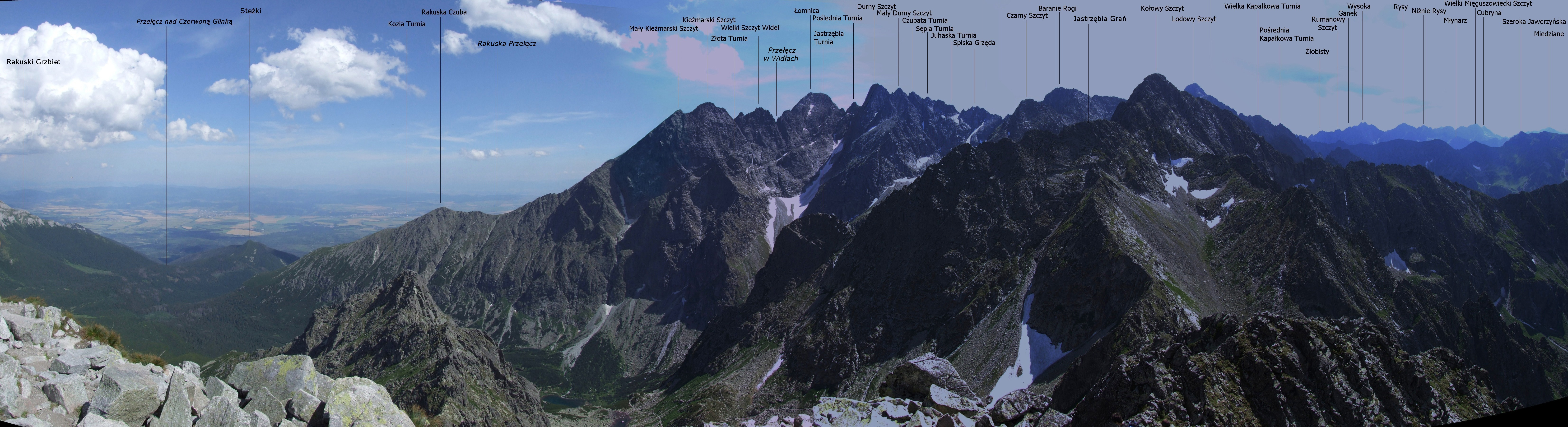 Panorama z Jagnięcego Szczytu